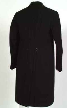 Jakett. Innskrift: K. Grude A/S Stavanger, Herr E. Brikelund 25/6-35 30590 M. Gave 1969. Produsert 1935, K. Grude A/S herrekonfeksjonsfabrikk, Stavanger, Rogaland, Norge. NF.1969-0068A